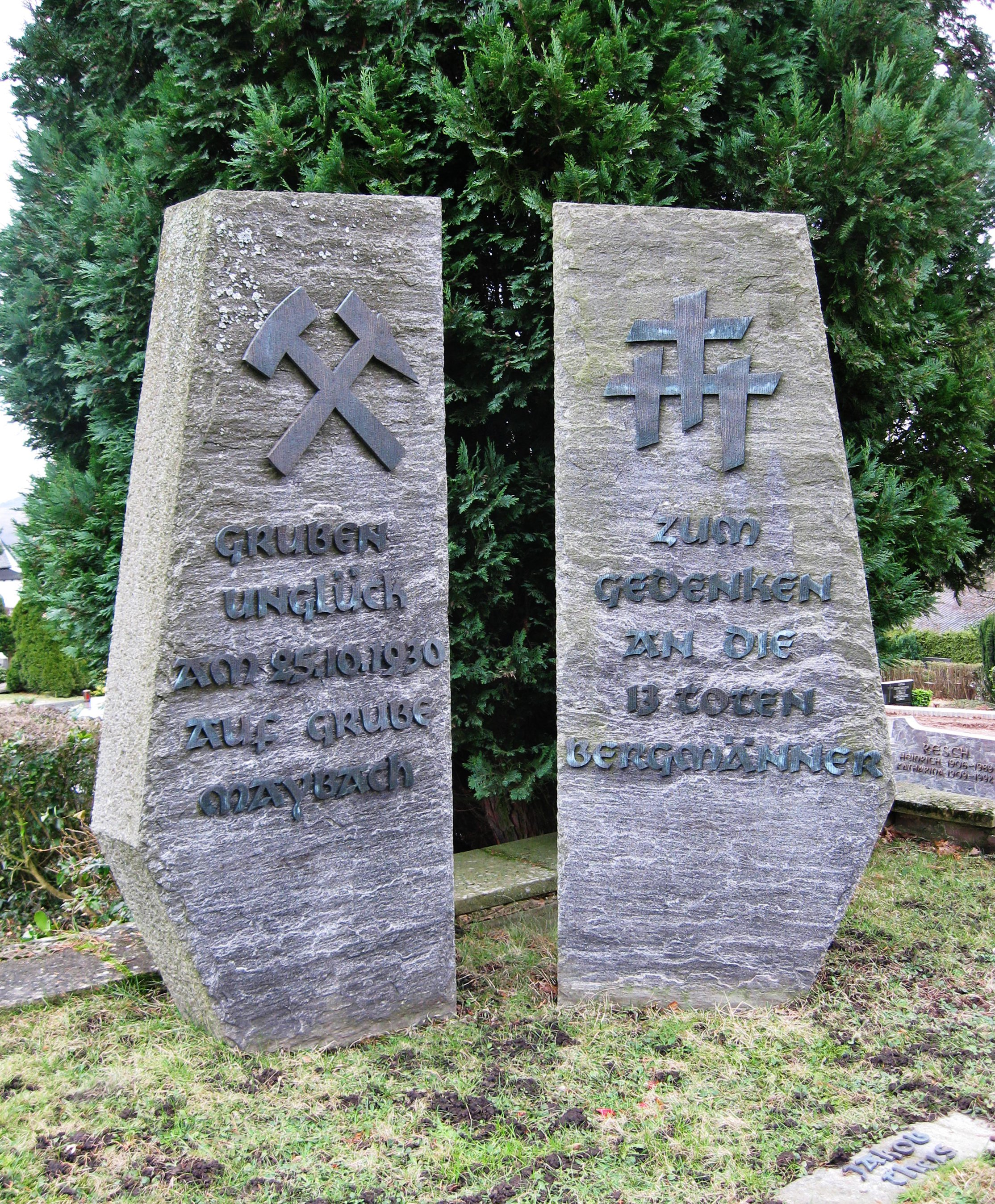 Denkmal für die 13 Opfer des Grubenunglücks vom 25.10.1930 in auf Grube Maybach im Saarland. "Grubenunglück am 25.10.1930 auf Grube Maybach. Zum Gedenken an die 13 Toten Bergmänner"